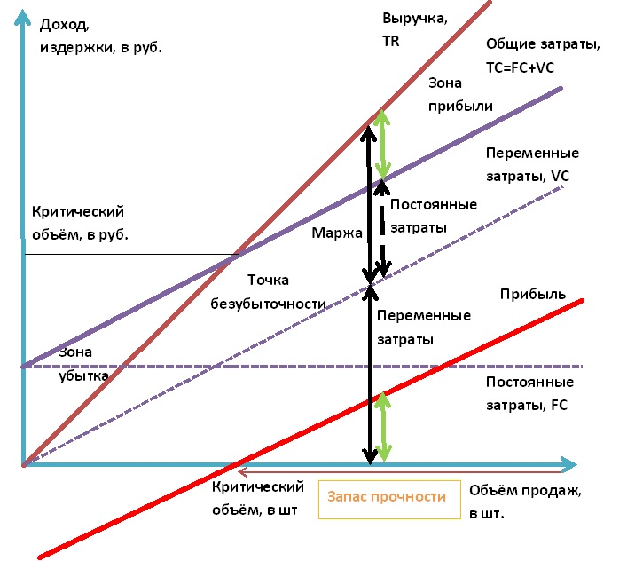 CVP-анализ (линейная функция). Точка безубыточности